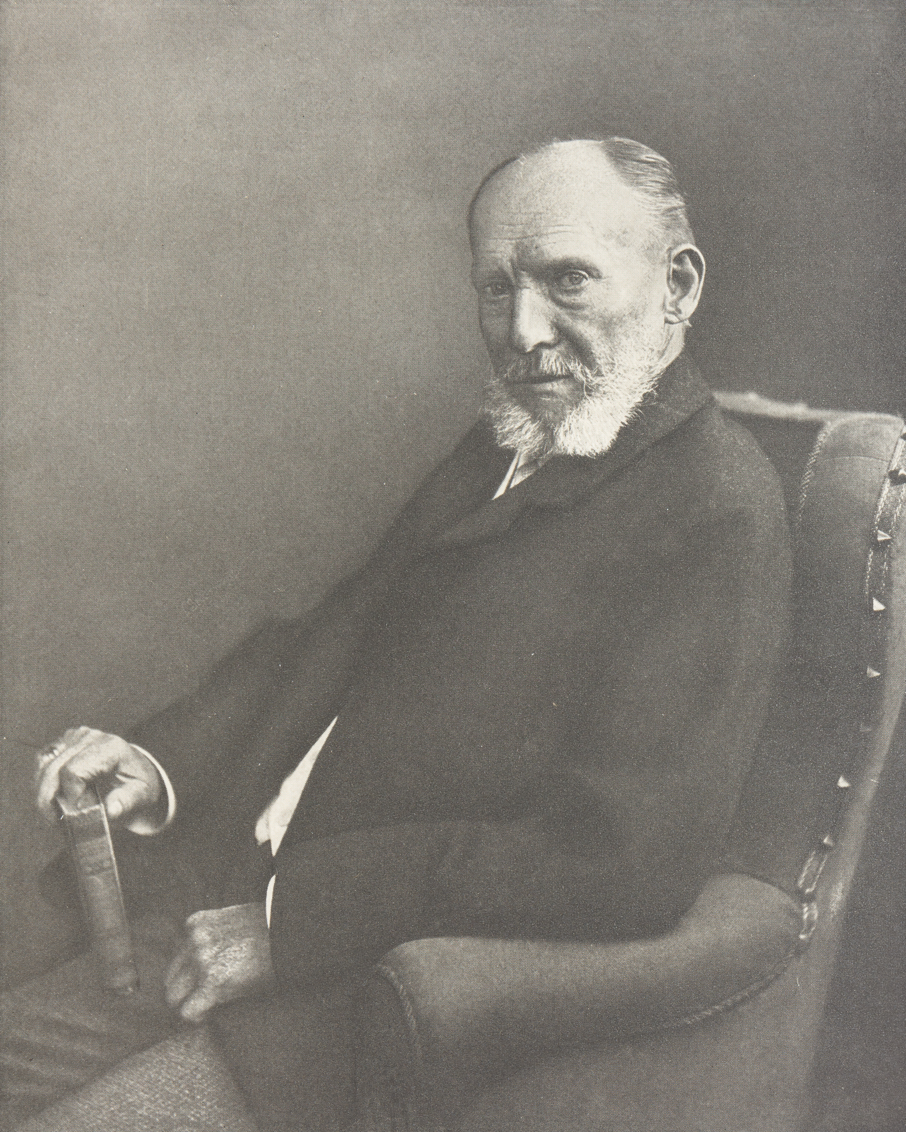 Fotografie